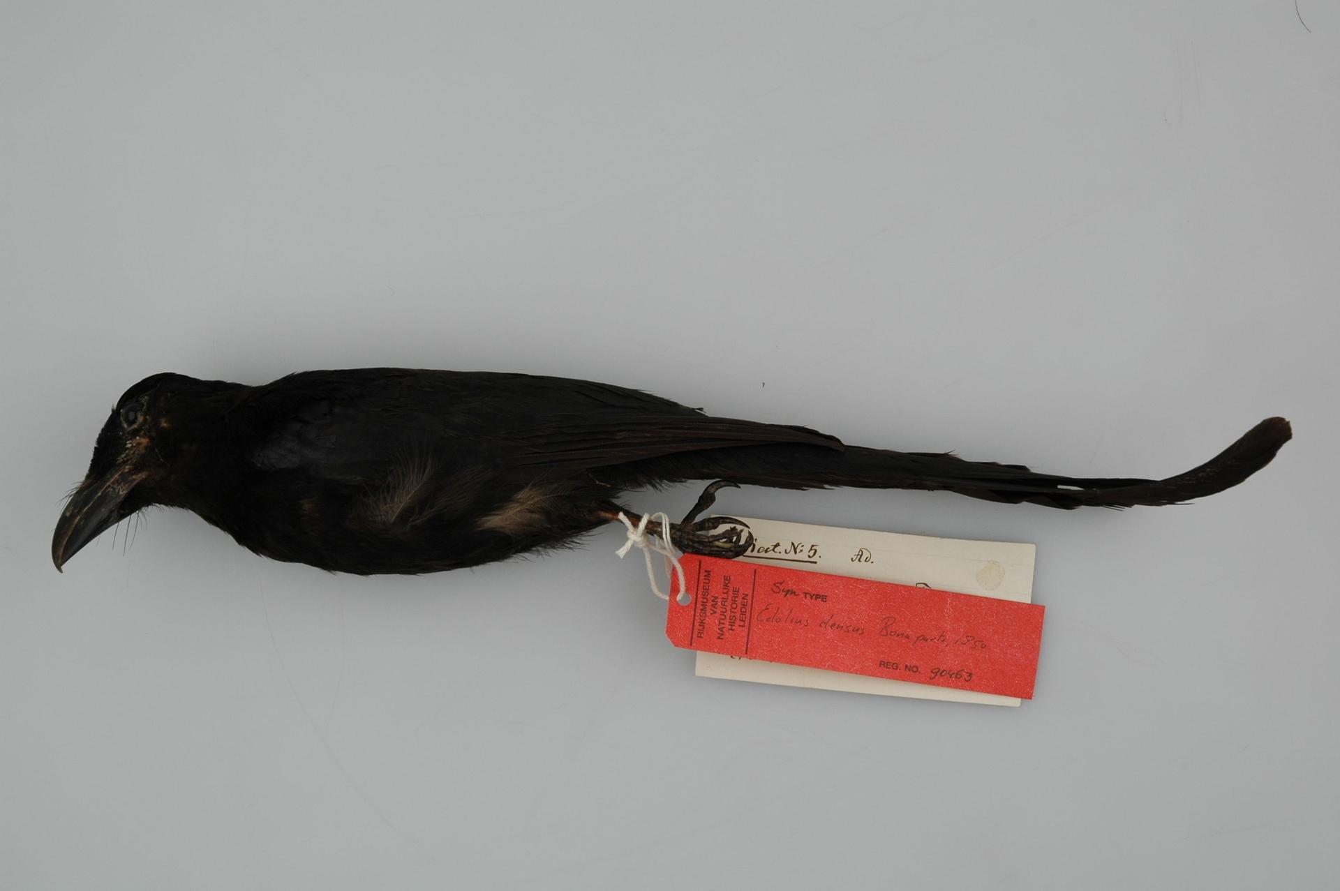 Dicrurus hottentottus densus Bonaparte, 1850